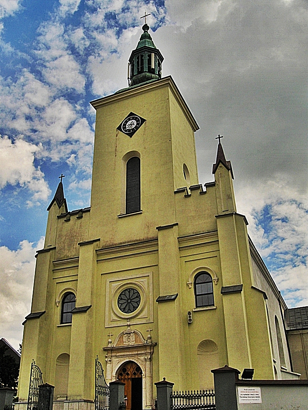 fasada